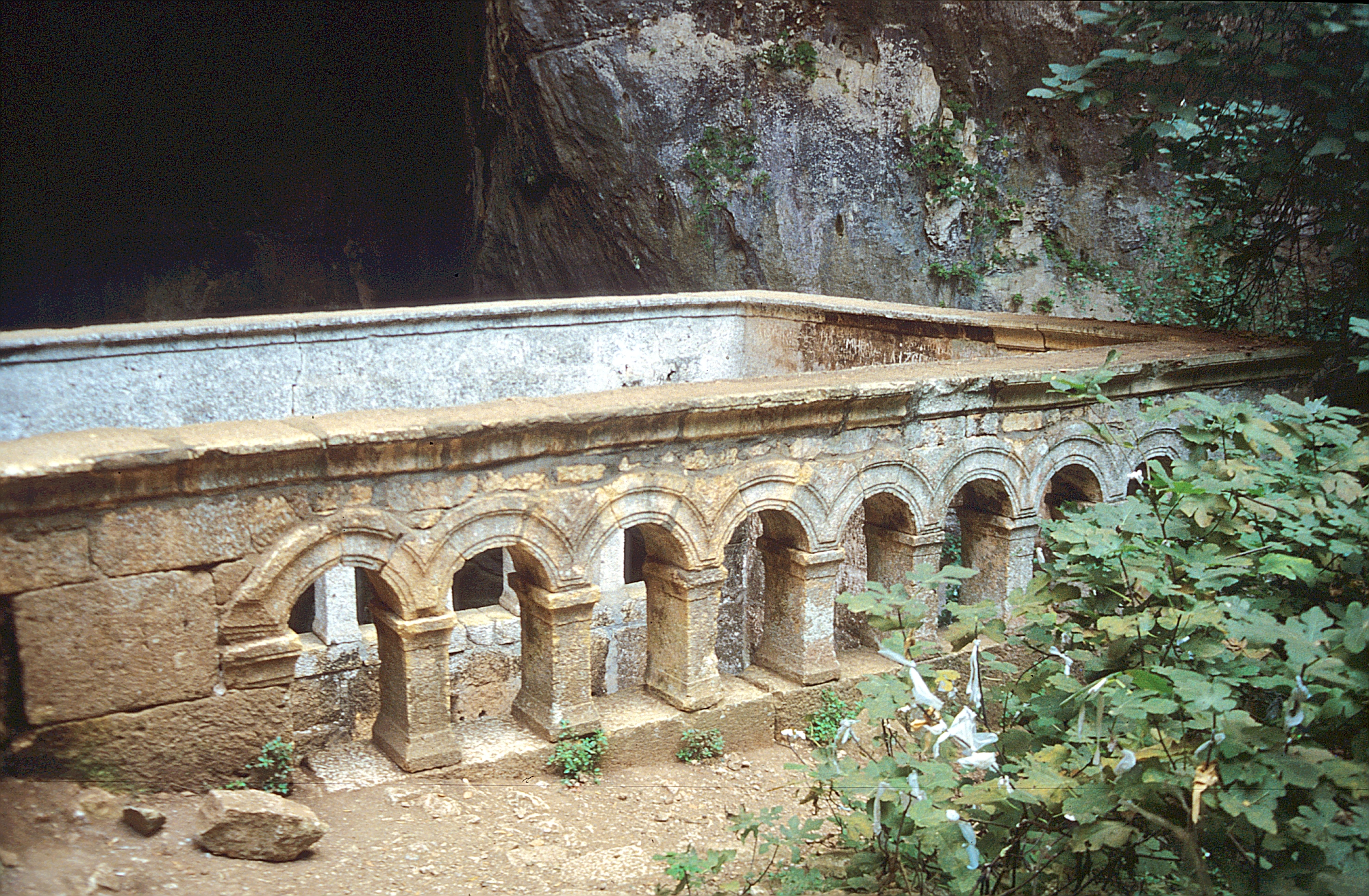 Marienkapelle in der Korykischen Grotte (Cennet ve Cehennem) in Kilikien, bei Narlikuyu an der türkischen Südküste